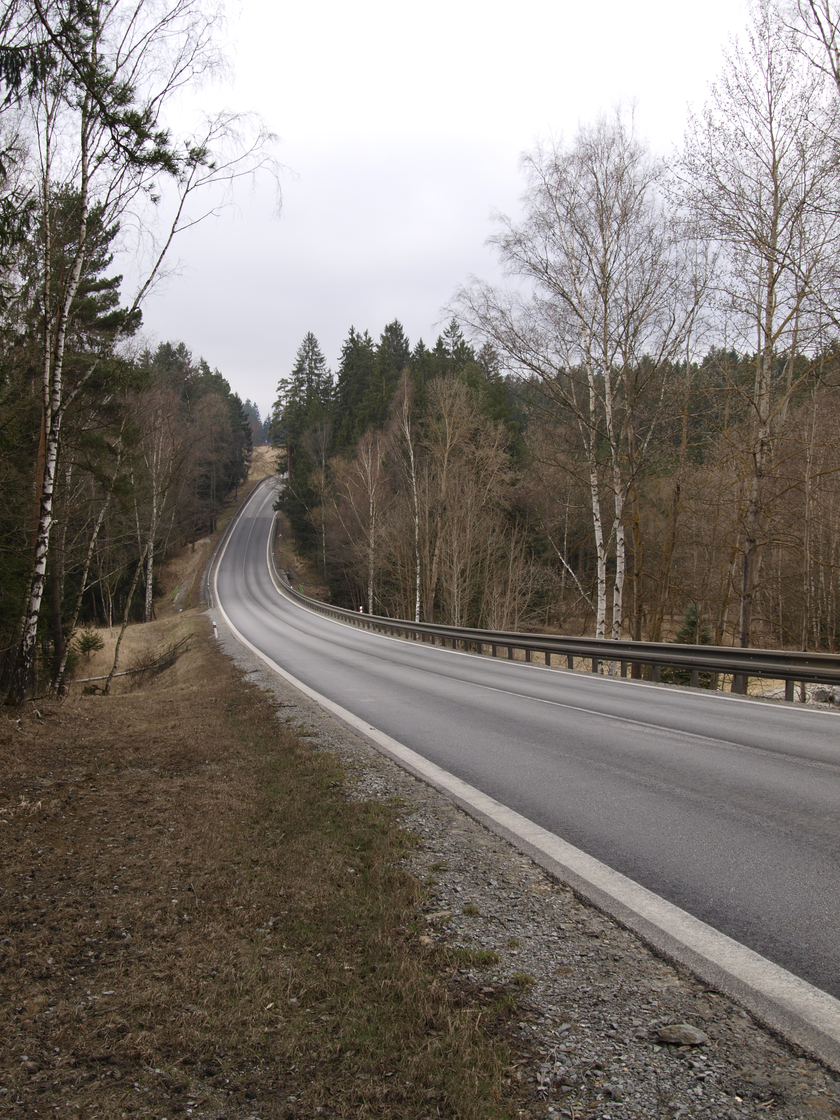 Nažidla, osada místní části Suchdol obce Bujanov, silnice I/3 v místě nehody (8. 3. 2003), pohled z levé krajnice směrem k můstku přes Hněvanovický potok. Autobus přijížděl z protějšího kopce ze směru od Dolního Dvořiště Project: Fotíme Česko.